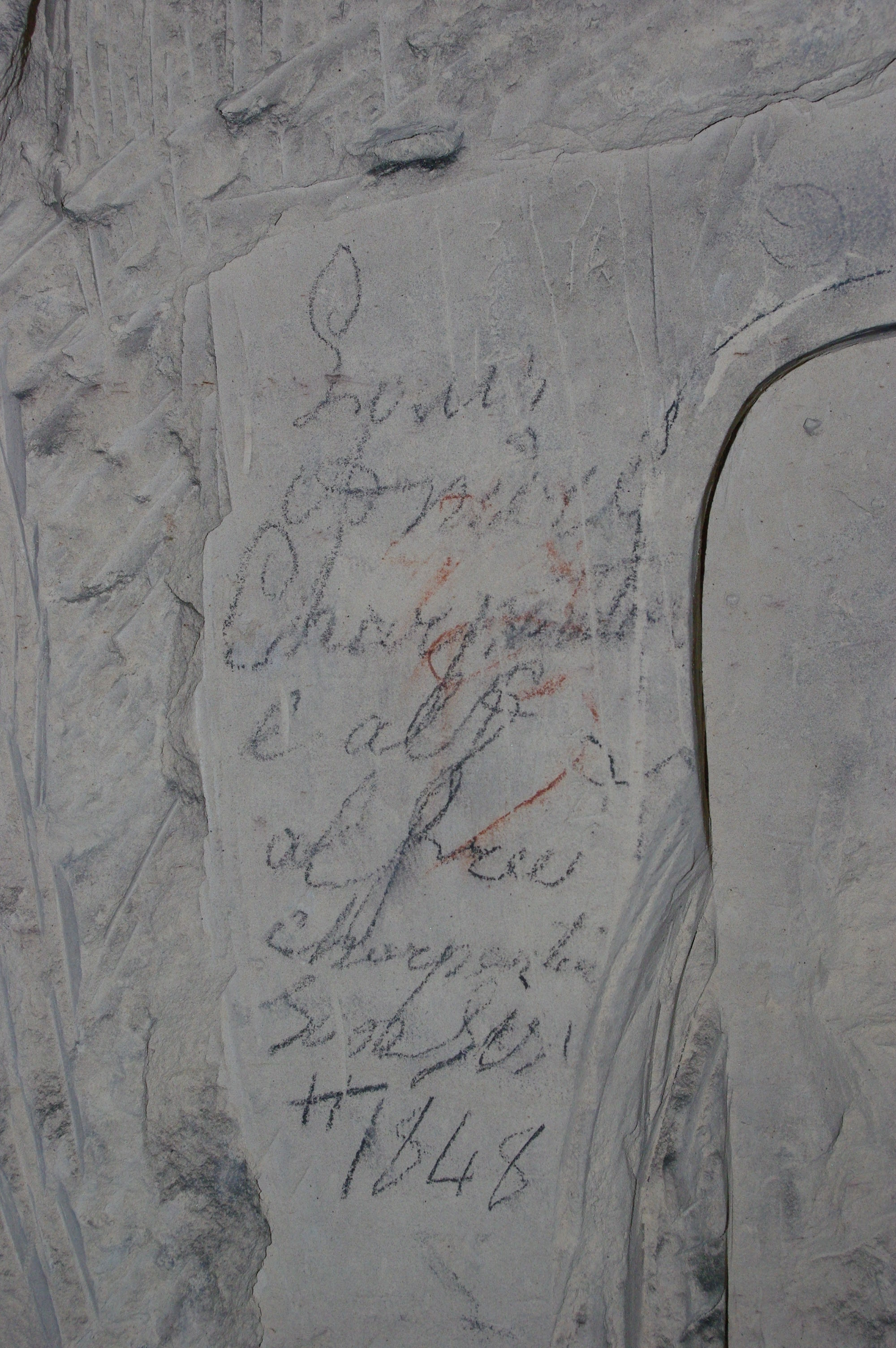 Ce décompte indiquant les noms des carriers ayant travaillés sur cette section de la carrière de Froidmont date de 1848.